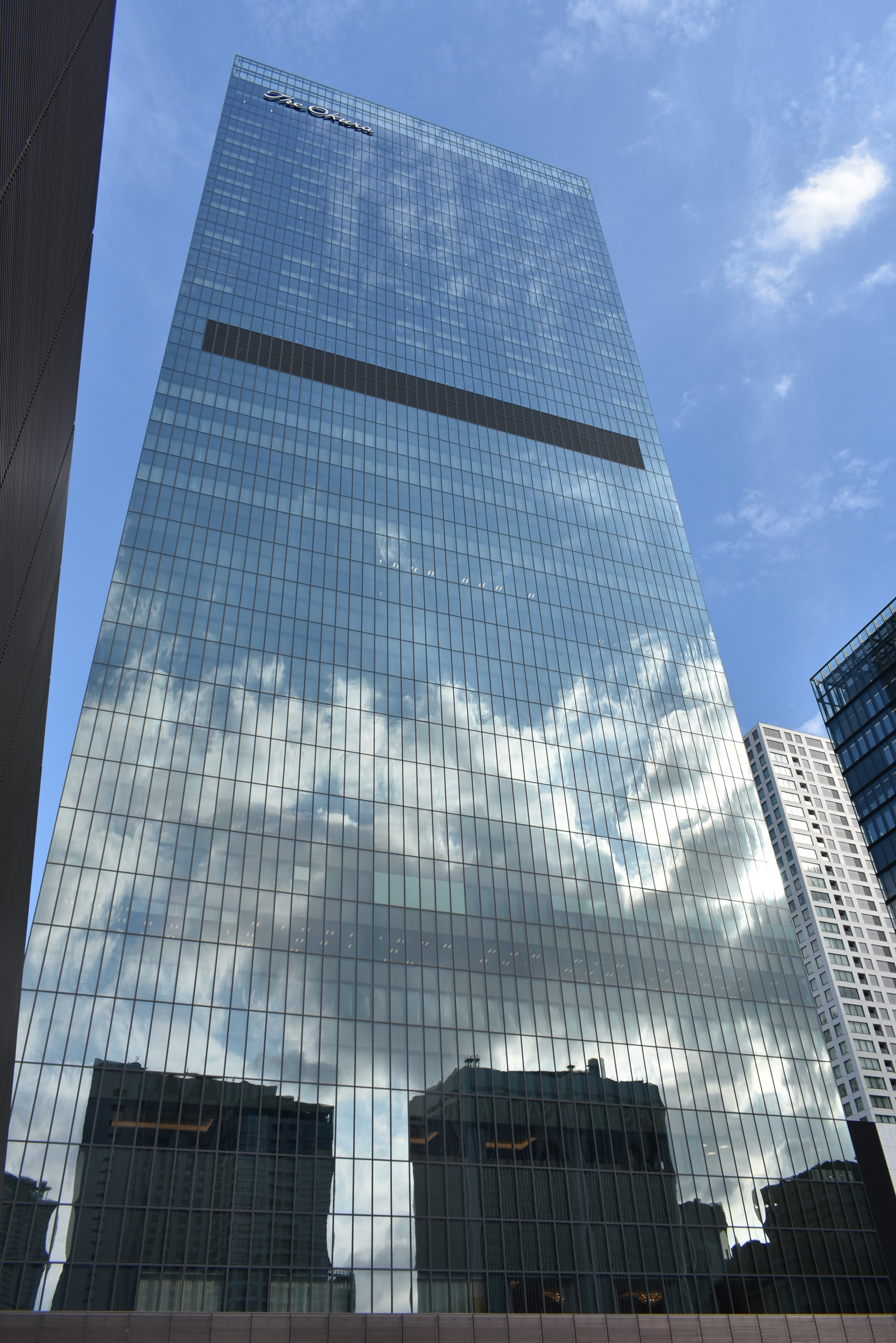 ホテルオークラ東京